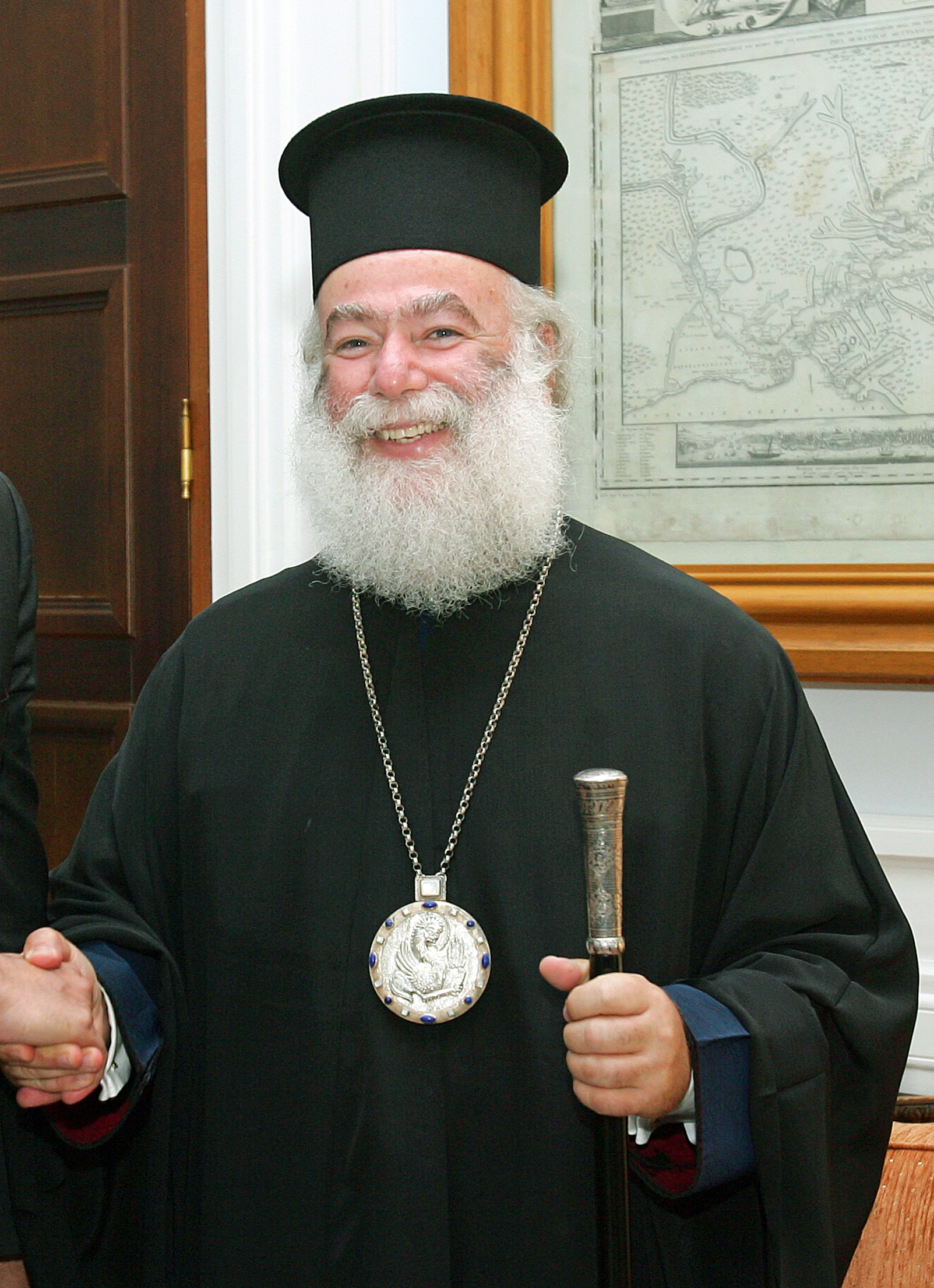 Συνάντηση ΥΠΕΞ Σ. Λαμπρινίδη με τον Πατριάρχη Αλεξανδρείας Θεόδωρο Β’ (Αθήνα, 13.07.2011)- Foreign Minister Lambrinidis meets with Patriarch of Alexandria Theodoros II (Athens, 13 July 2011) (Πηγή: ΑΠΕ-ΜΠΕ)